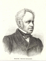 Moritz Veit (1808-1864), Verleger, Politiker und jüdischer Interessenvertreter